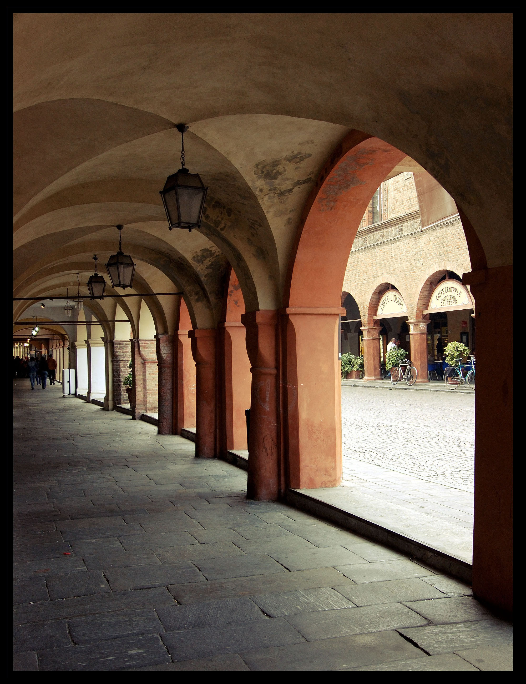 Busseto, Emilia Romagna, Italia